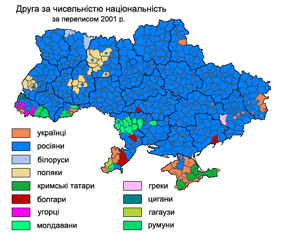 Second nationality according to 2001 census: Друга за чисельністю національність за даними перепису 2001 року